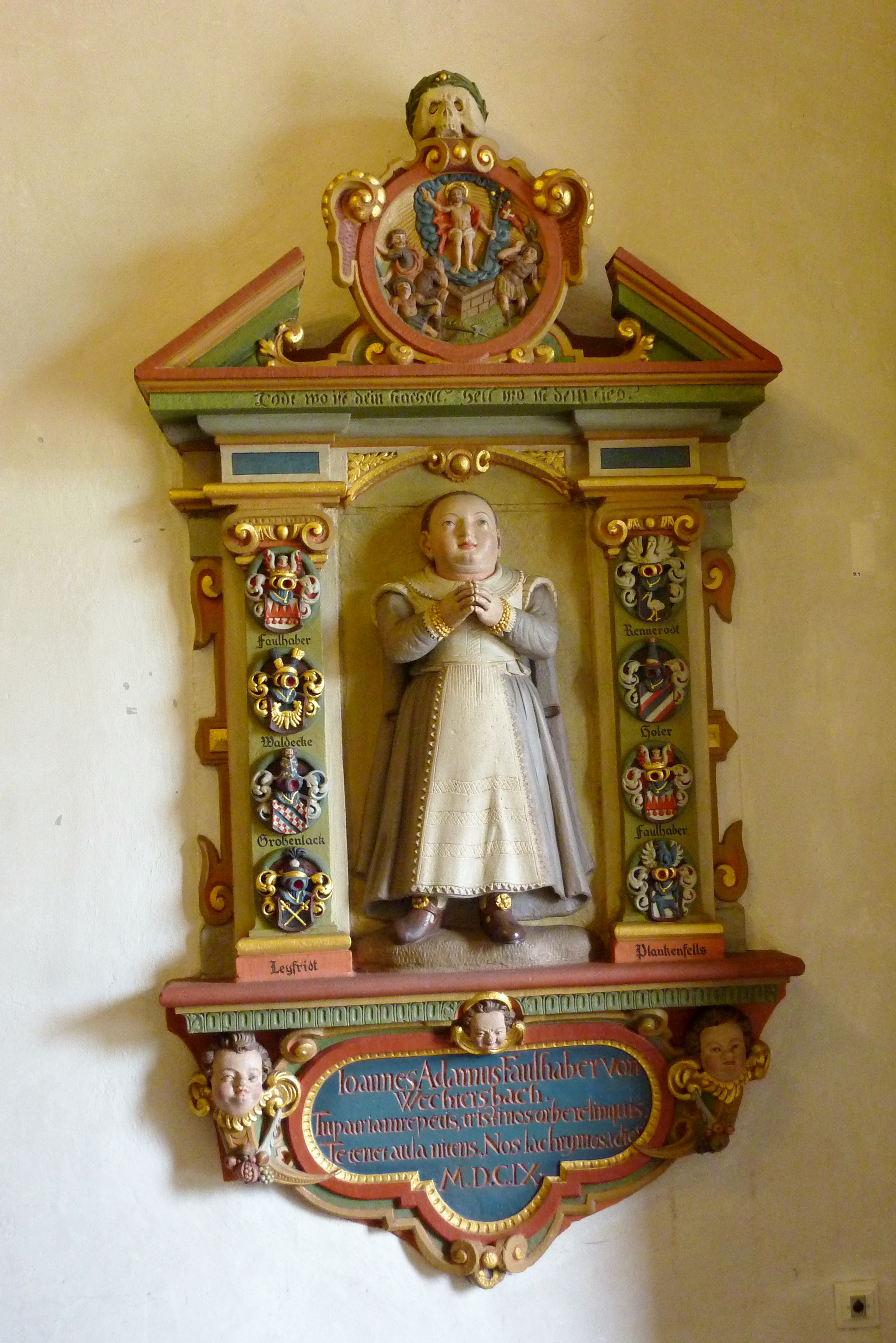 Epitaph von 1609 für Johann Faulhaber in der katholischen Pfarrkirche St. Martin in Bad Orb im Main-Kinzig-Kreis (Hessen)